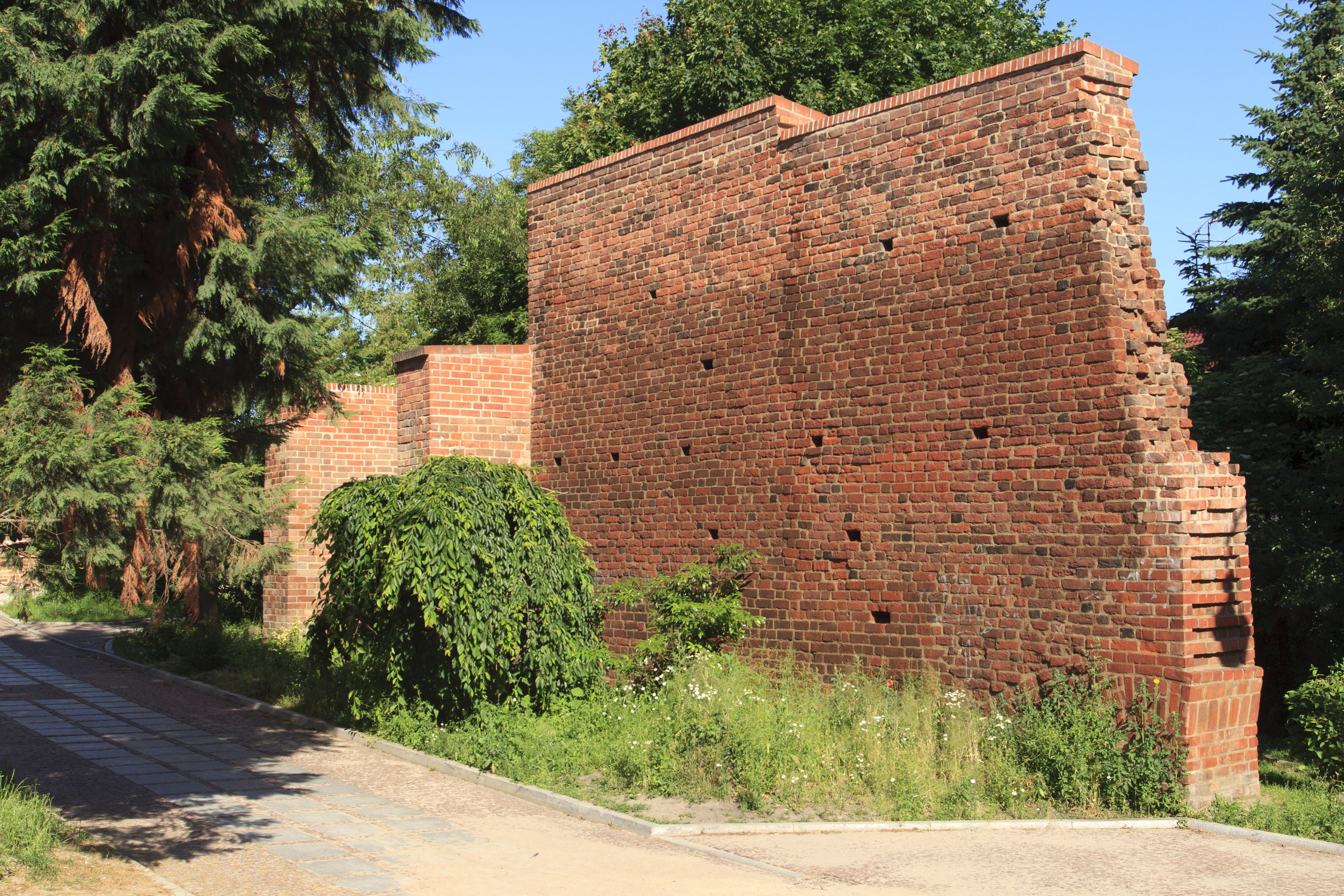 Zdjęcie przedstawia fragment zachowanych murów miejskich w Koszalinie, fragment ten jest zlokalizowany u zbiegu ulic Marii Ludwiki i Księżnej Anastazji